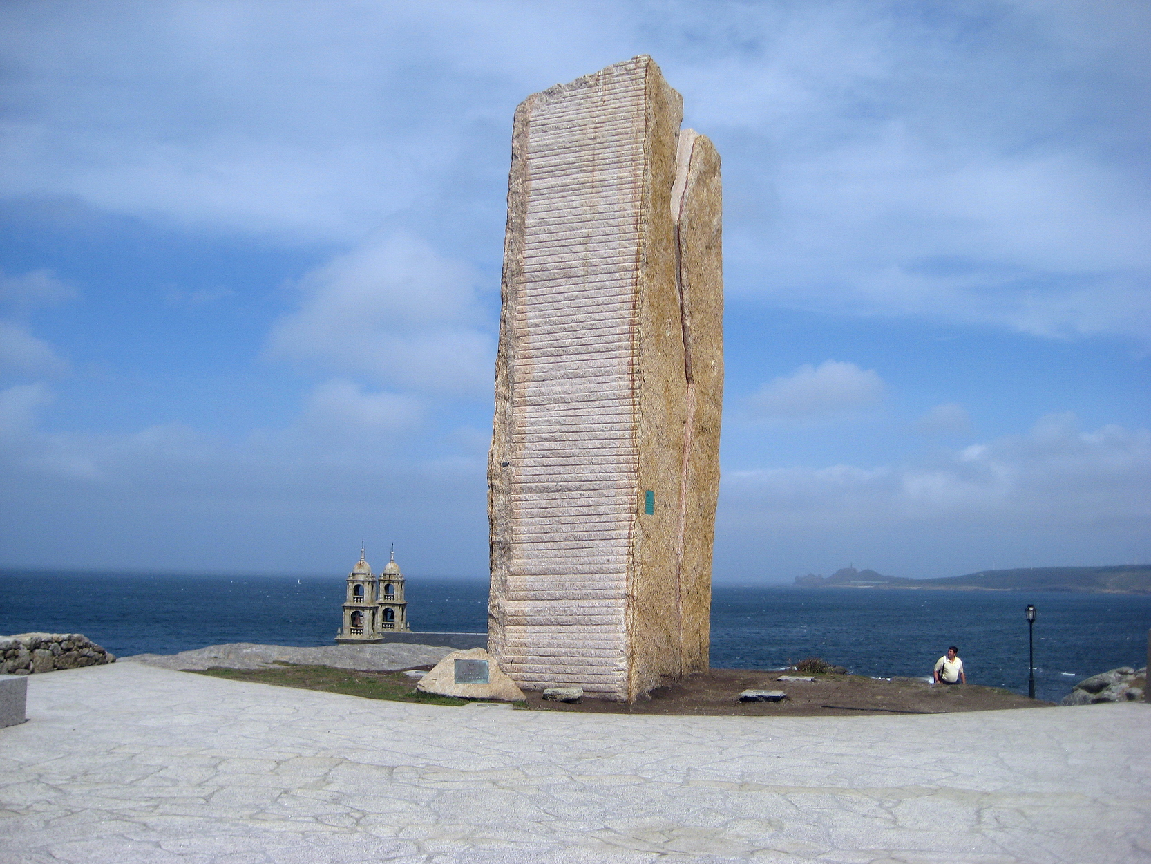 Pedra da Ferida, Muxía, Galicia, Spain. Monumento que lembra a desgraza do Prestige